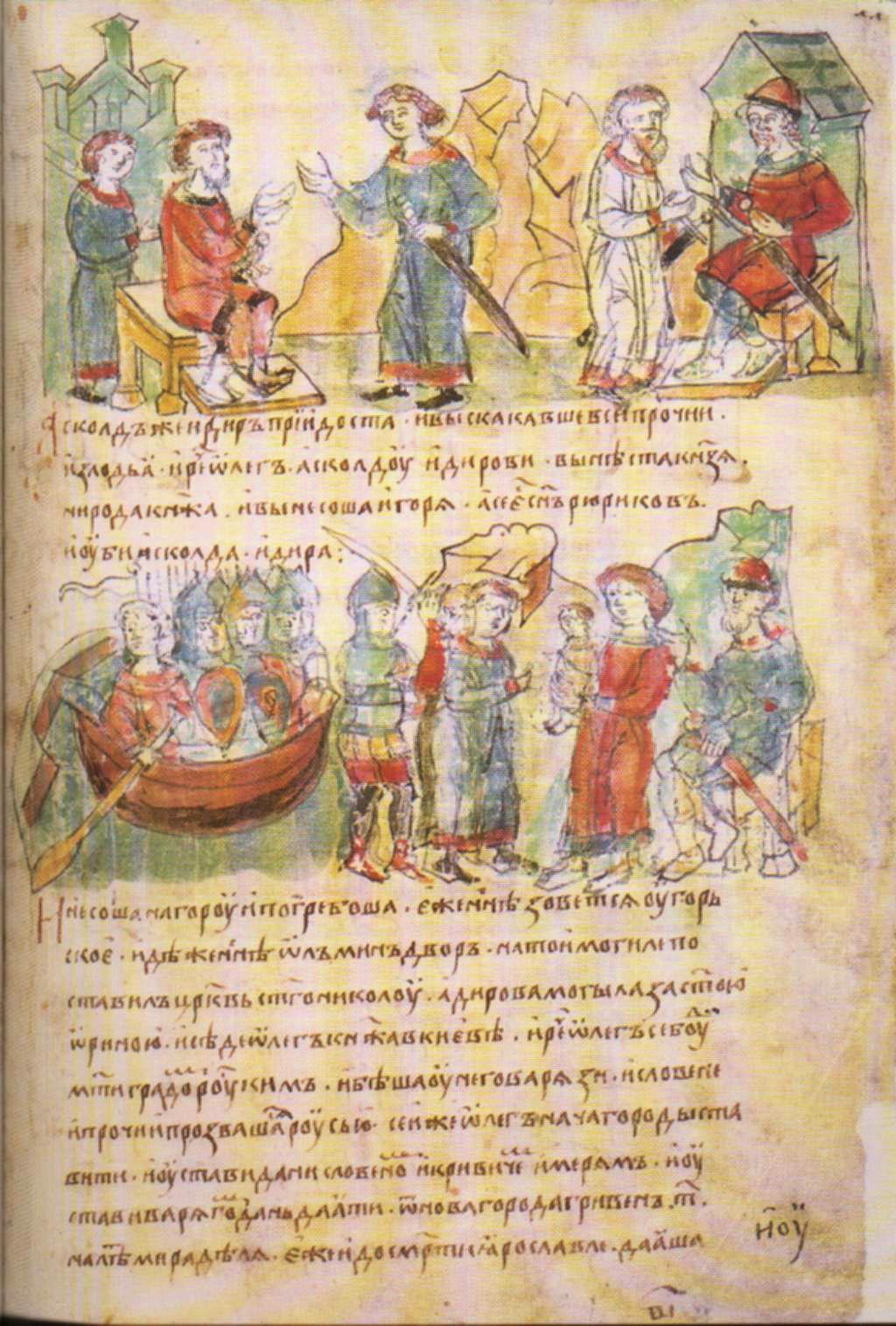 Radzivill chronicle. List 11, front. Вещий Олег показывает Игоря Аскольду и Диру.